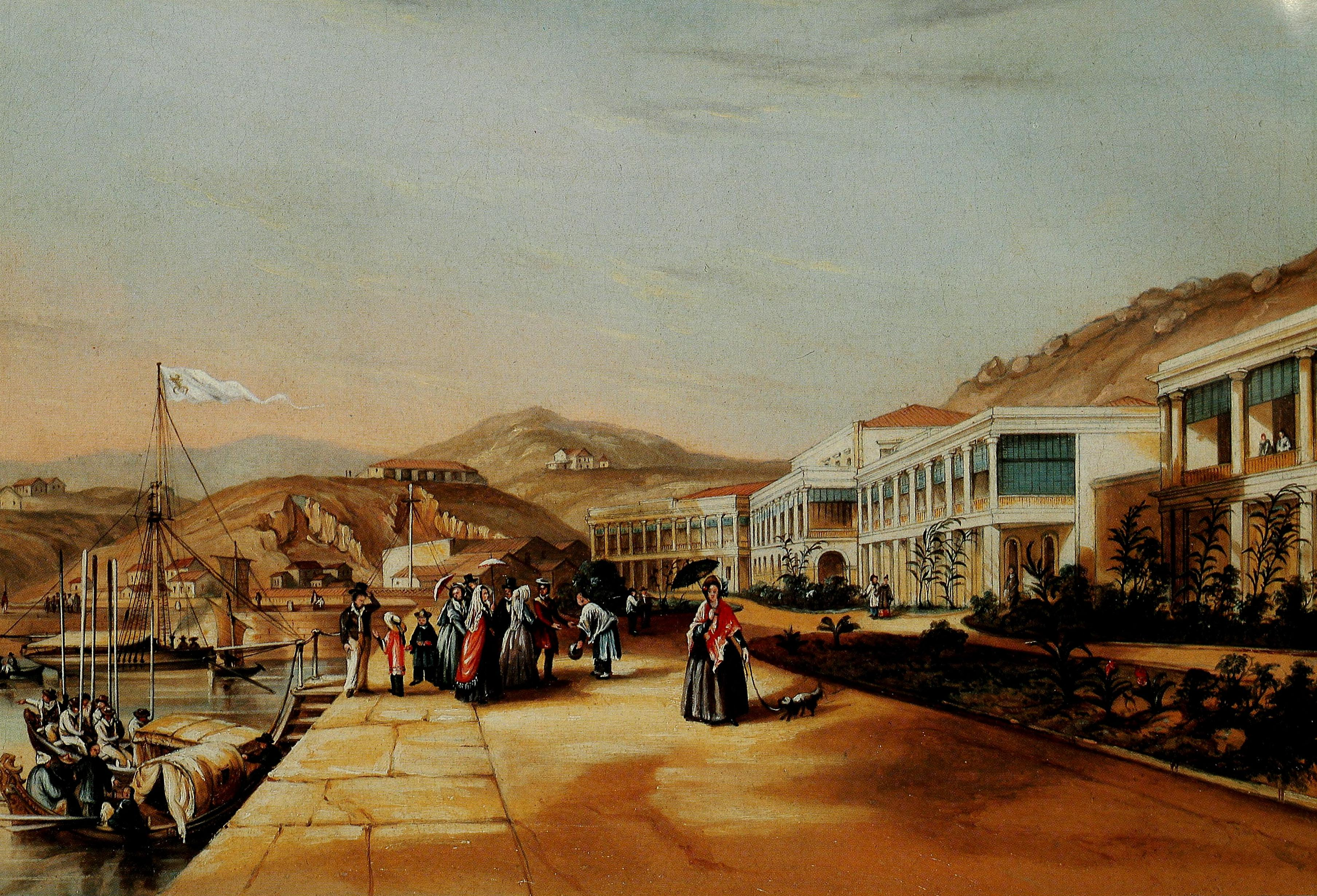 Spring Gardens, looking east, in Hong Kong.